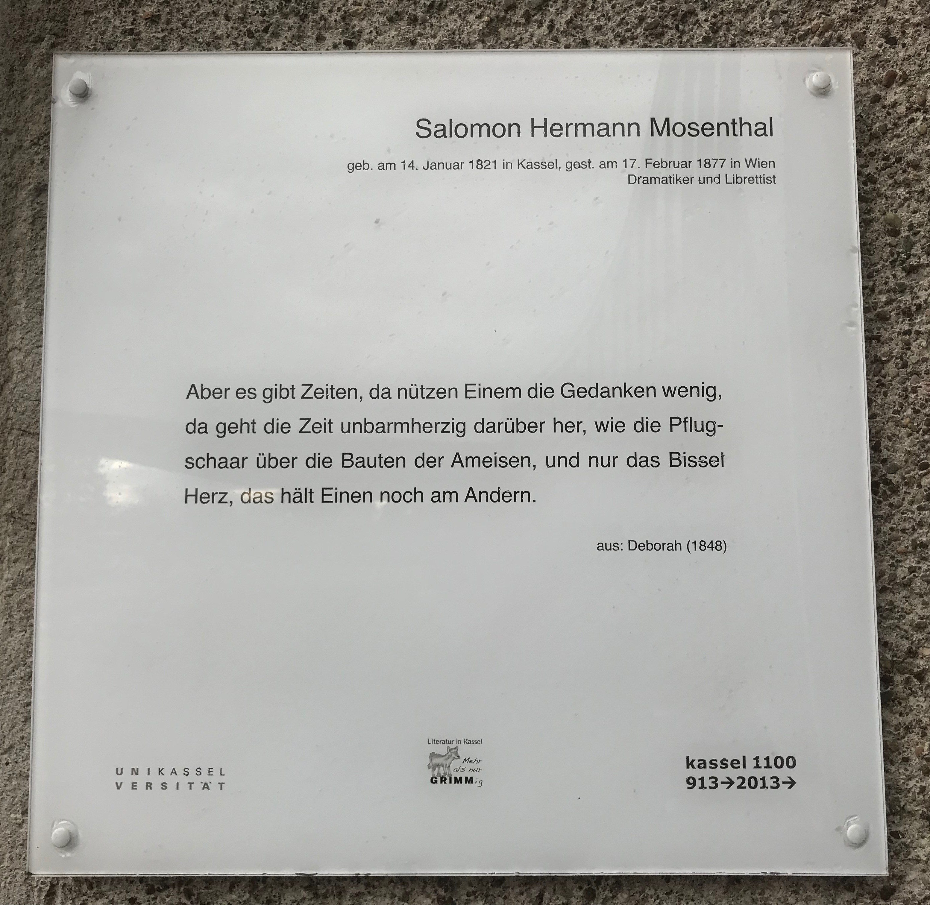 Ehrentafel für Mosenthal am Staatstheater in Kassel